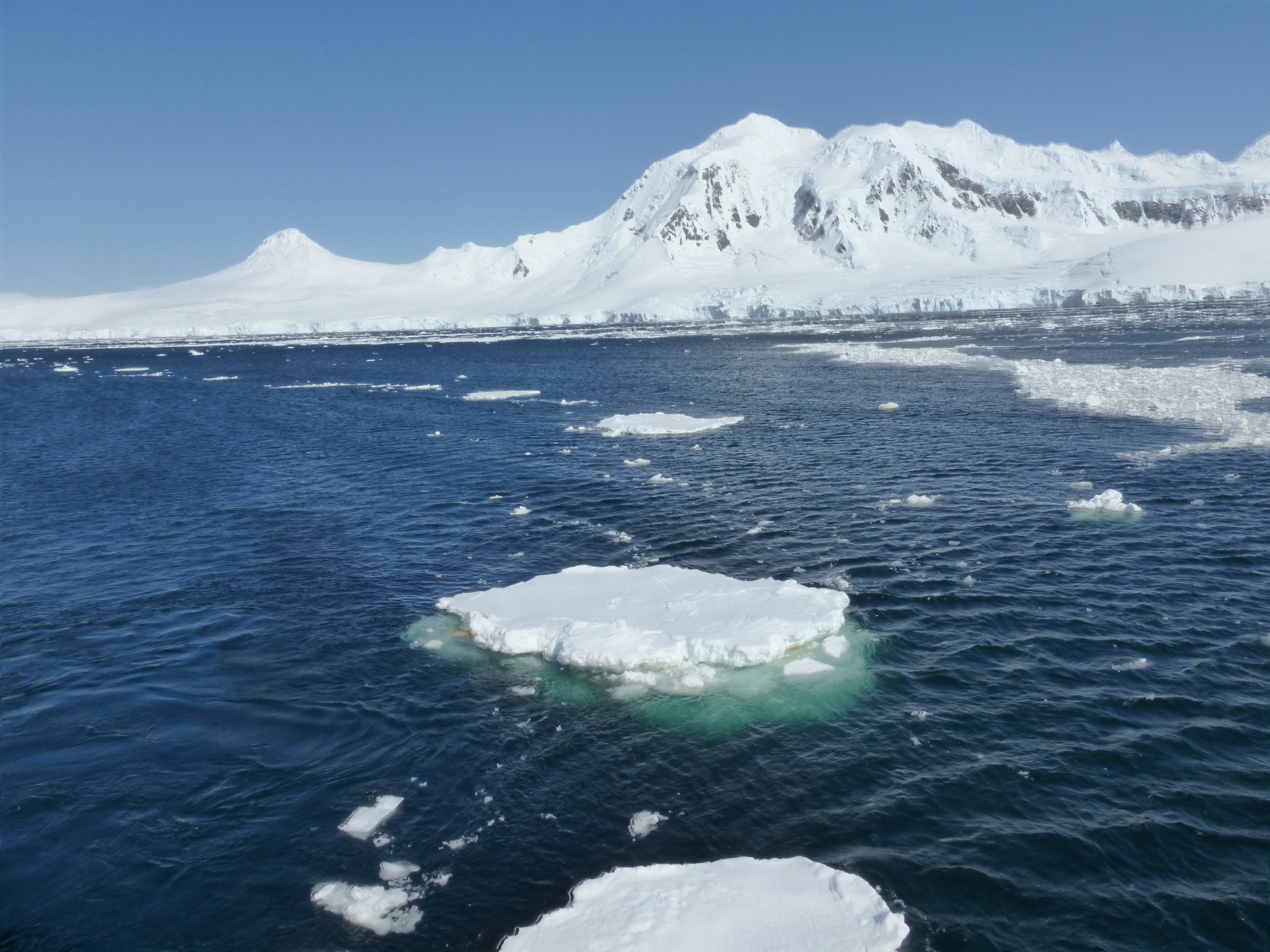 chenal situé dans la péninsule antarctique séparant l'île Anvers de l'île Wiencke